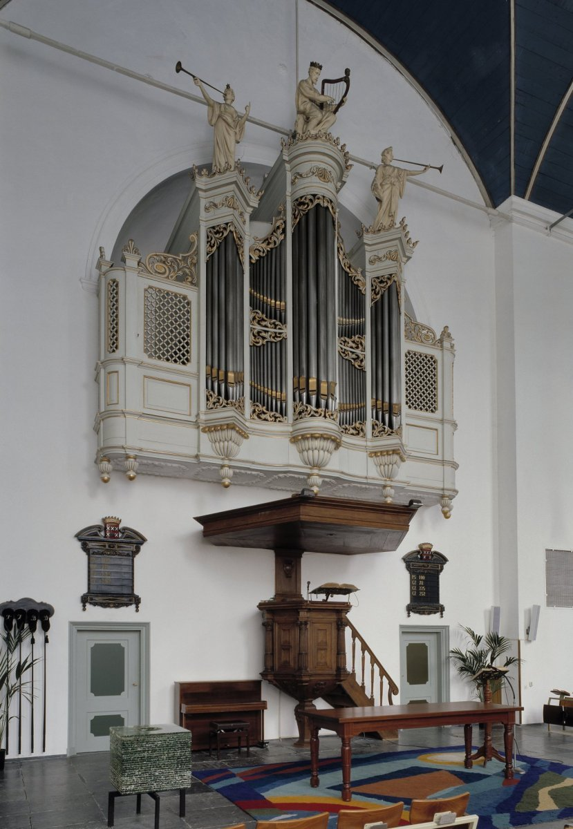 Nederlands Hervormde Kerk: Interieur, aanzicht orgel, orgelnummer 1198 (opmerking: Gefotografeerd voor Het Historische Orgel in Nederland 1858-1865)